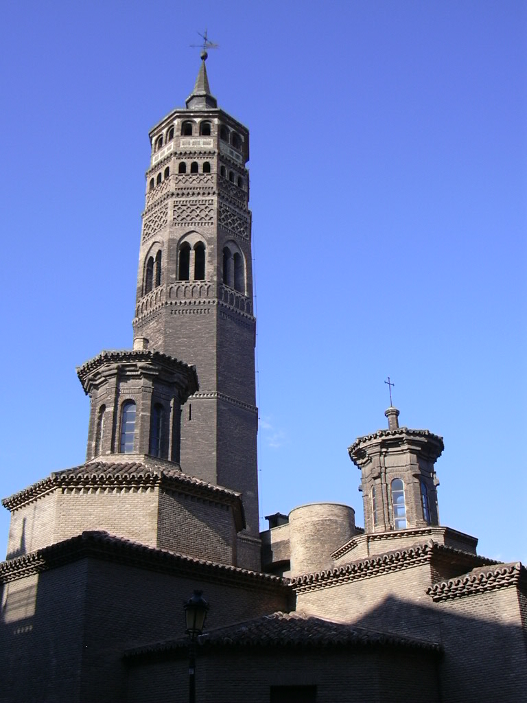 Zaragoza - San Pablo - Torre y tejados